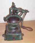 moulin de comptoir peugeot maodèle AO